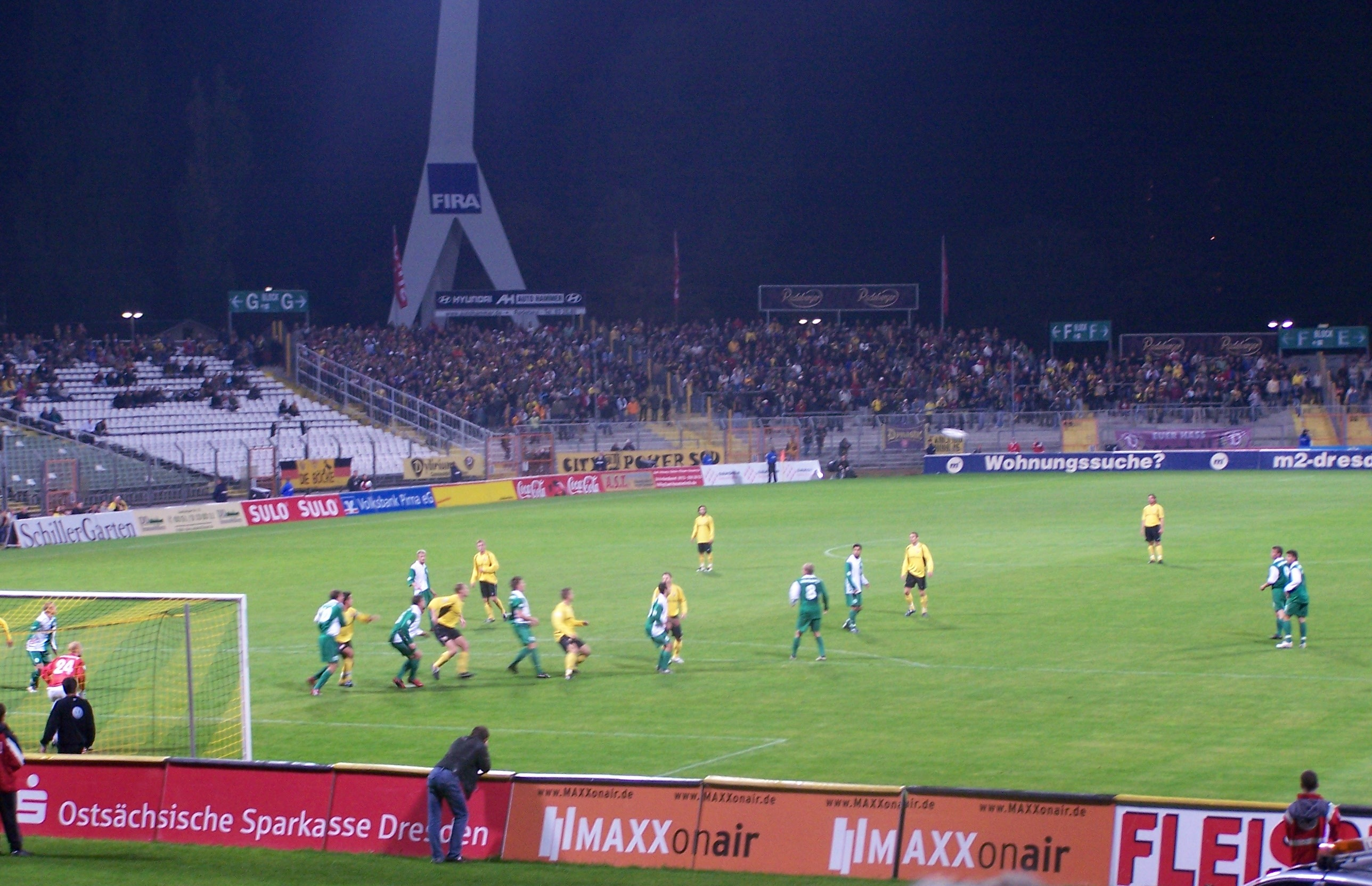 Flutlichtspiel gegen die Wolfsburg-Amateure der SG Dynamo Dresden